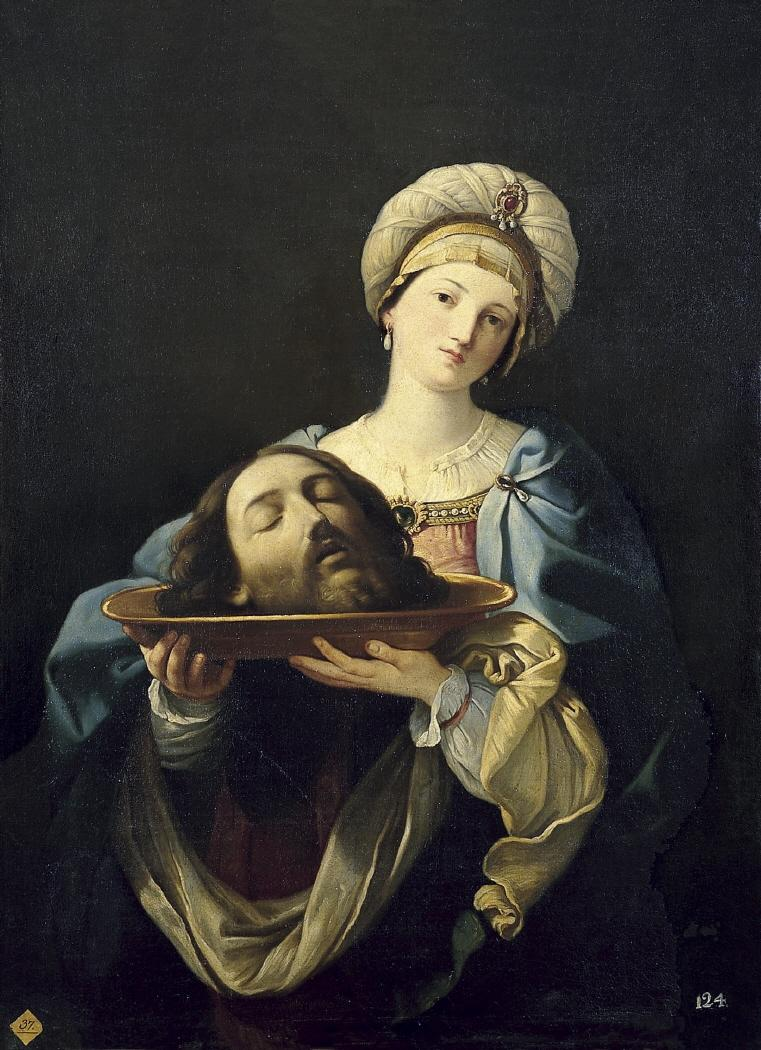 La obra representa a la princesa judía Salomé llevando en sus manos una cabeza donde está despositada la cabeza cercenada del profeta San Juan Bautista, precursor del Mesías. Y conviene añadir que esta obra es una copia del cuadro original de Guido Reni que se conserva en la Galleria Nazionale d'Arte Antica de la ciudad de Roma.